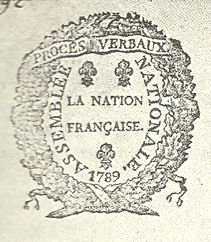 Escudo de la Asamblea Nacional y la Asamblea Legislativa de Francia desde 1789. Aunque se puede apreciar Asamblée Nationale, según el sitio en que aparece, se utilizó también por parte de la Asamblea Legislativa.